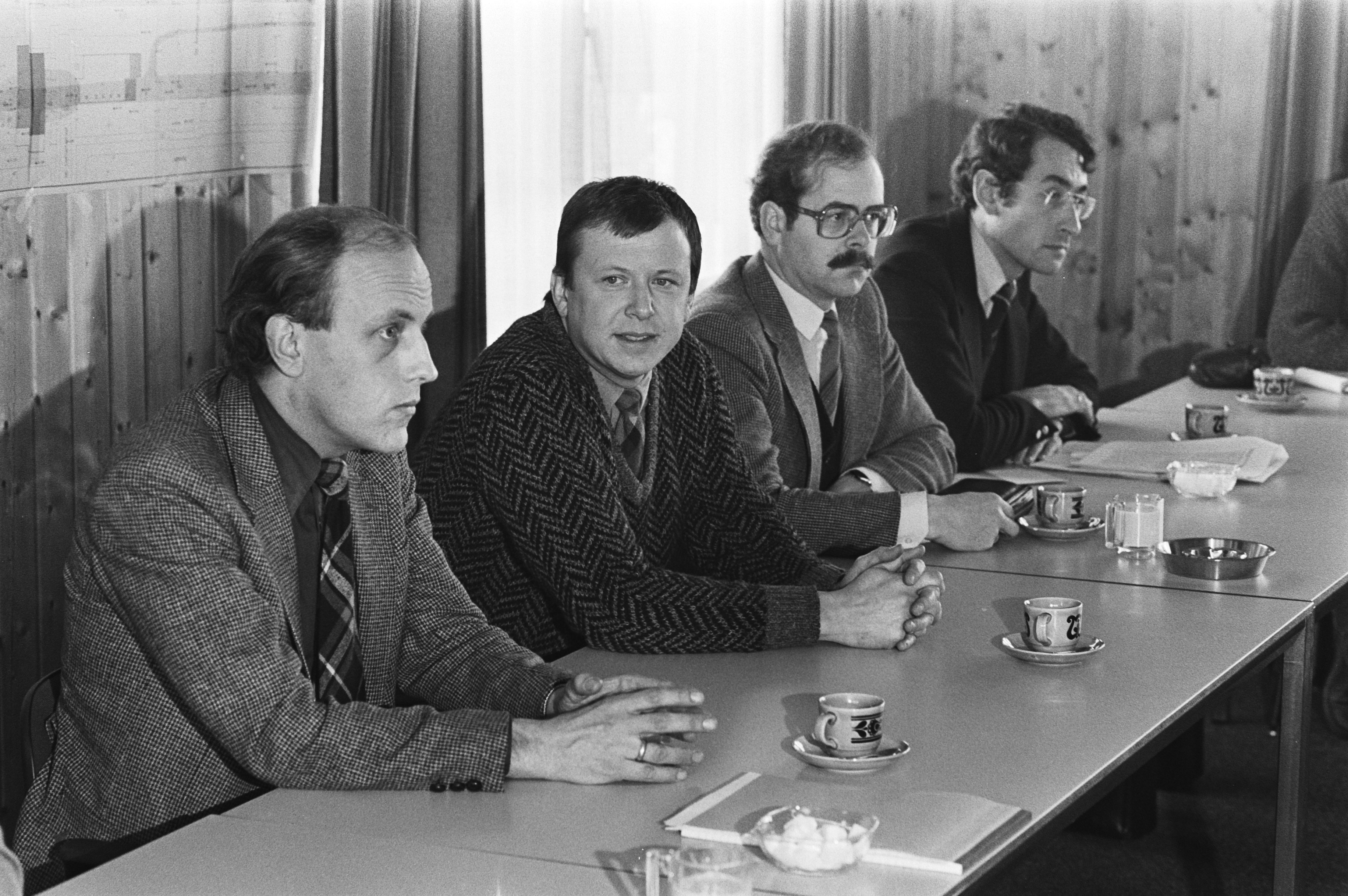 Collectie / Archief : Fotocollectie Anefo Reportage / Serie : [ onbekend ] Beschrijving : Laatste afgraving in gifwijk van Lekkerkerk, persconferenie Stellingwerf , Ouwerkerk en De Jong , Molenkamp Datum : 13 januari 1981 Locatie : Lekkerkerk Trefwoorden : afgravingen, burgemeesters, gifwijken, persconferenties, wethouders Fotograaf : Antonisse, Marcel / Anefo Auteursrechthebbende : Nationaal Archief Materiaalsoort : Negatief (zwart/wit) Nummer archiefinventaris : bekijk toegang 2.24.01.05 Bestanddeelnummer : 931-2550